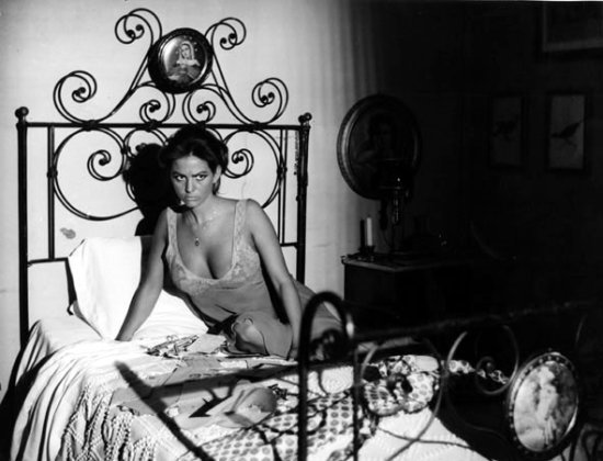 fotogramma catturato da "Vaghe stelle dell'Orsa" film del 1965, diretto dal regista Luchino Visconti.